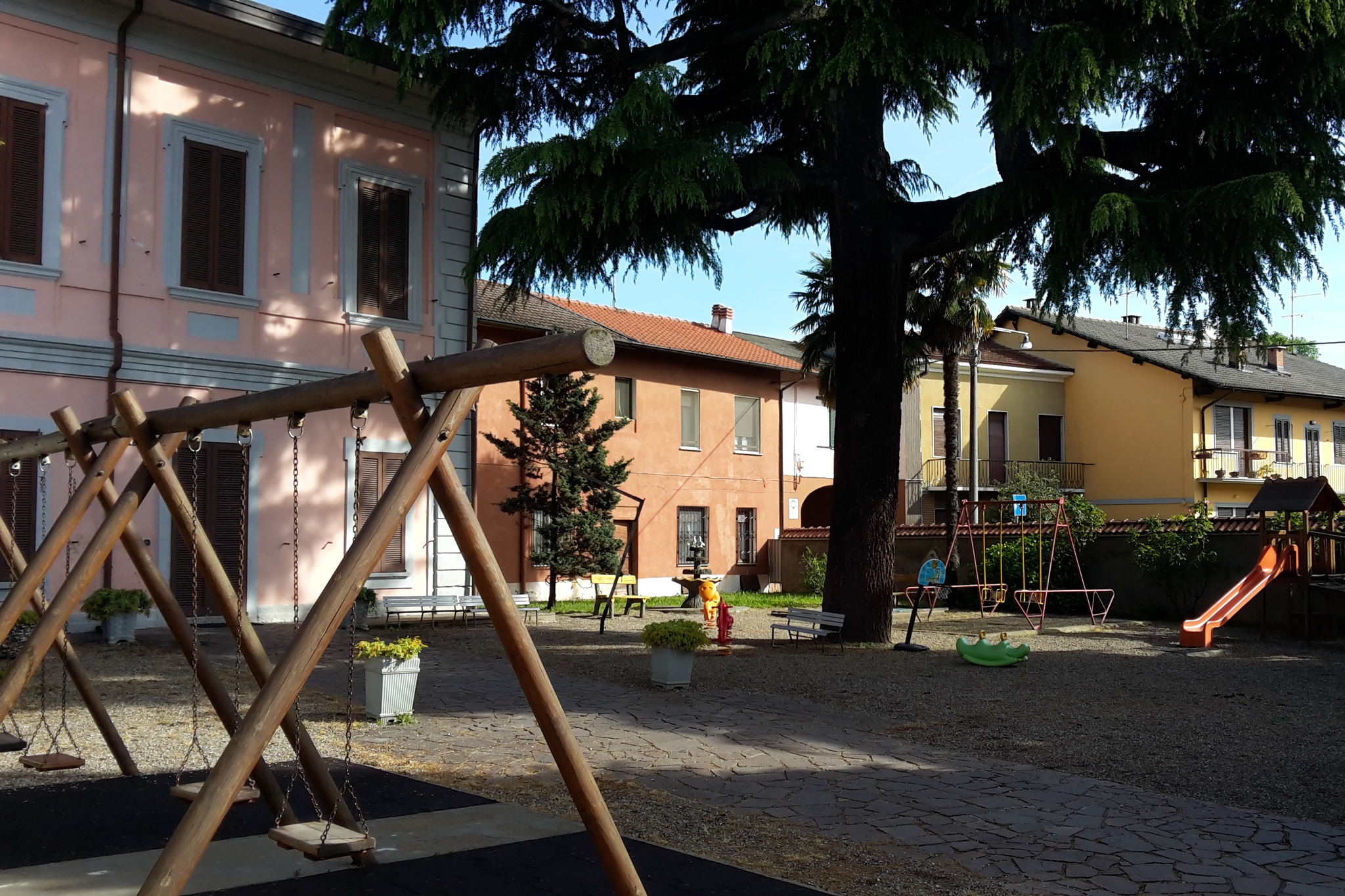 Parco della scuola dell'infanzia Fornaroli di Pontevecchio, fondata nel 1914